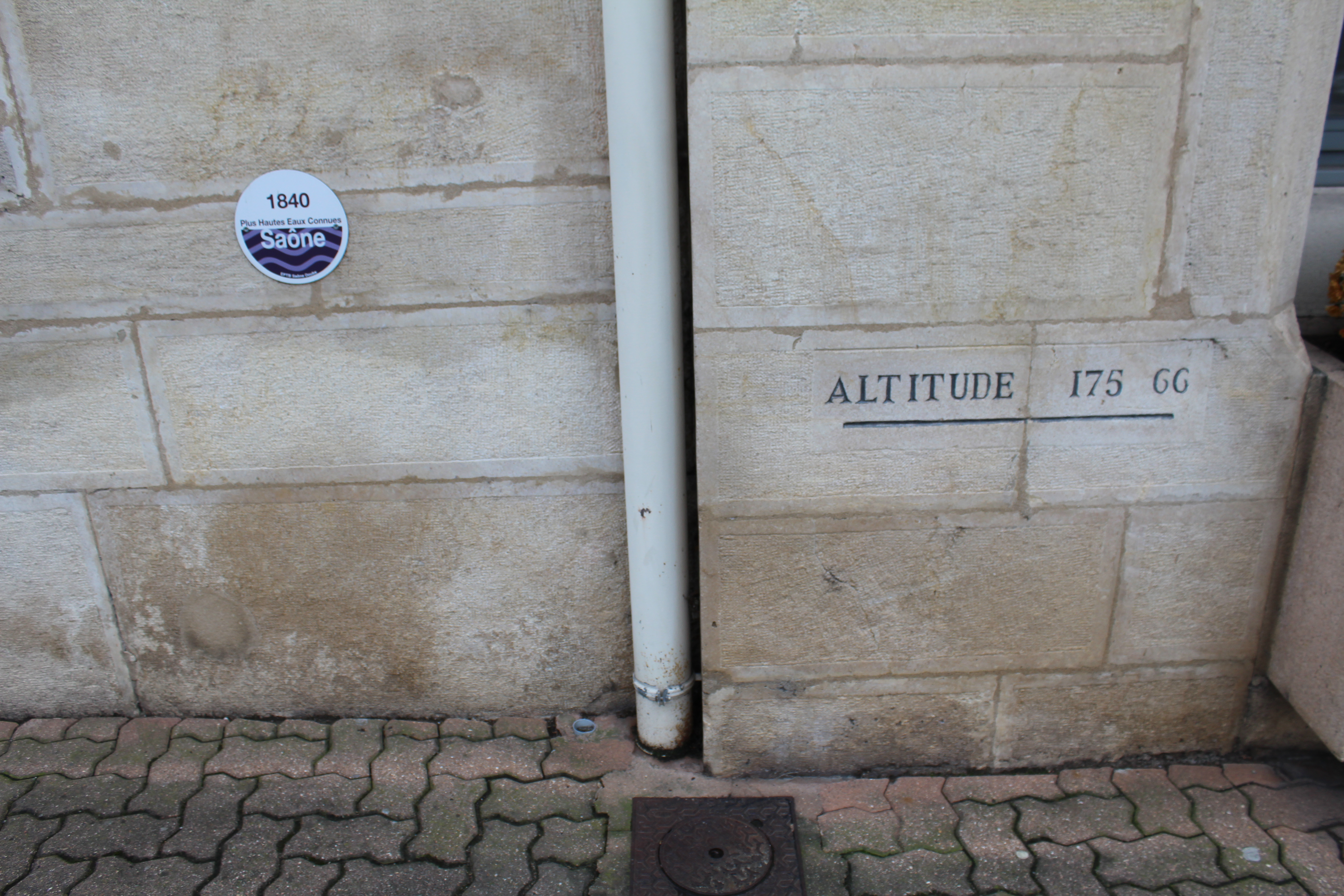 Repères du niveau de la Saône lors de la crue de 1840 et d'altitude sur la façade de l'hôtel de ville de Thoissey.